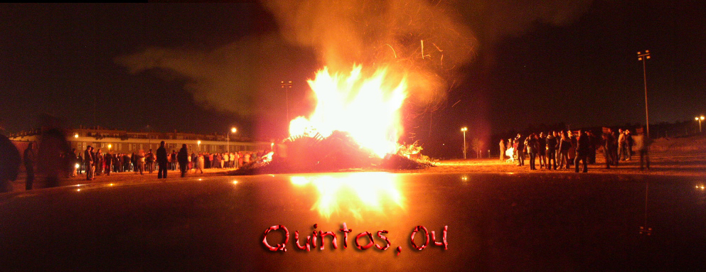 Autor: Un roceño exiliado a la sierra